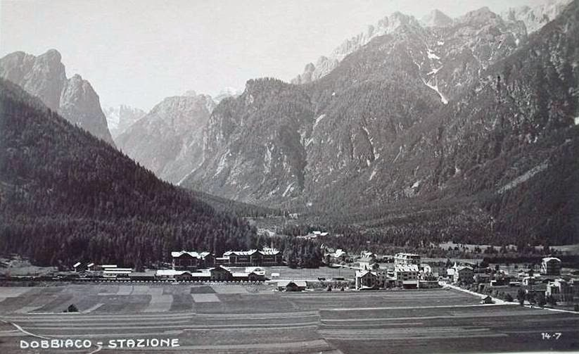 Bahnhof Toblach